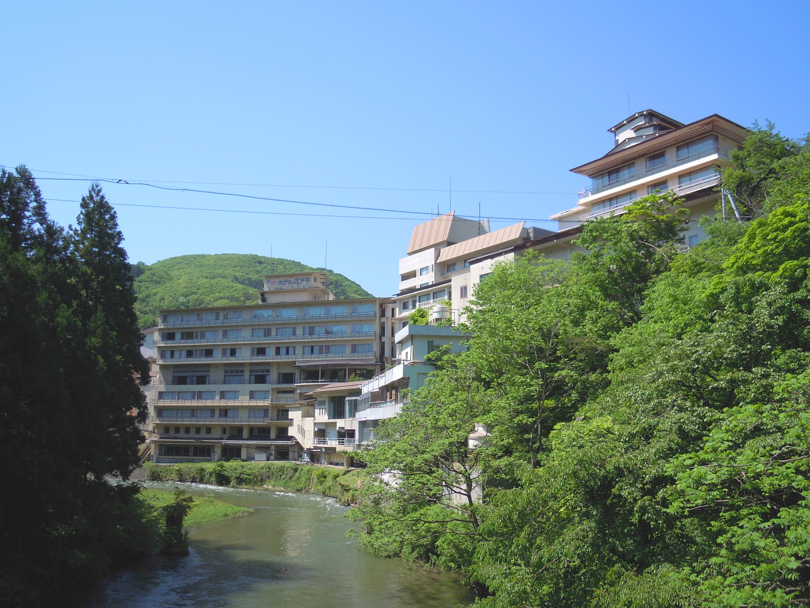 岩手県花巻市にある志戸平温泉の中でも最も規模の大きいホテル志戸平。豊沢川に架かる天王橋から。